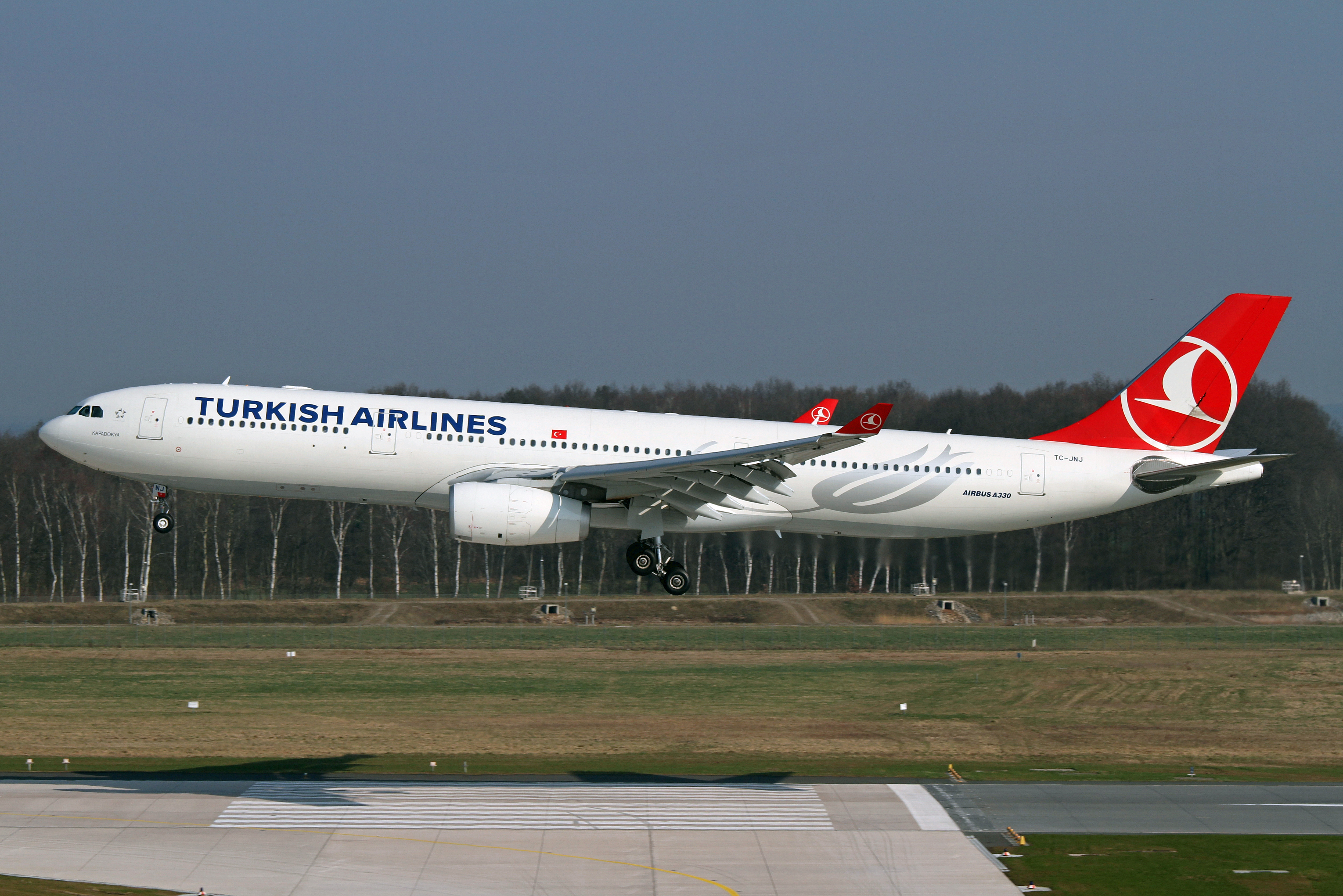 HAJ/EDDV 24-03-12